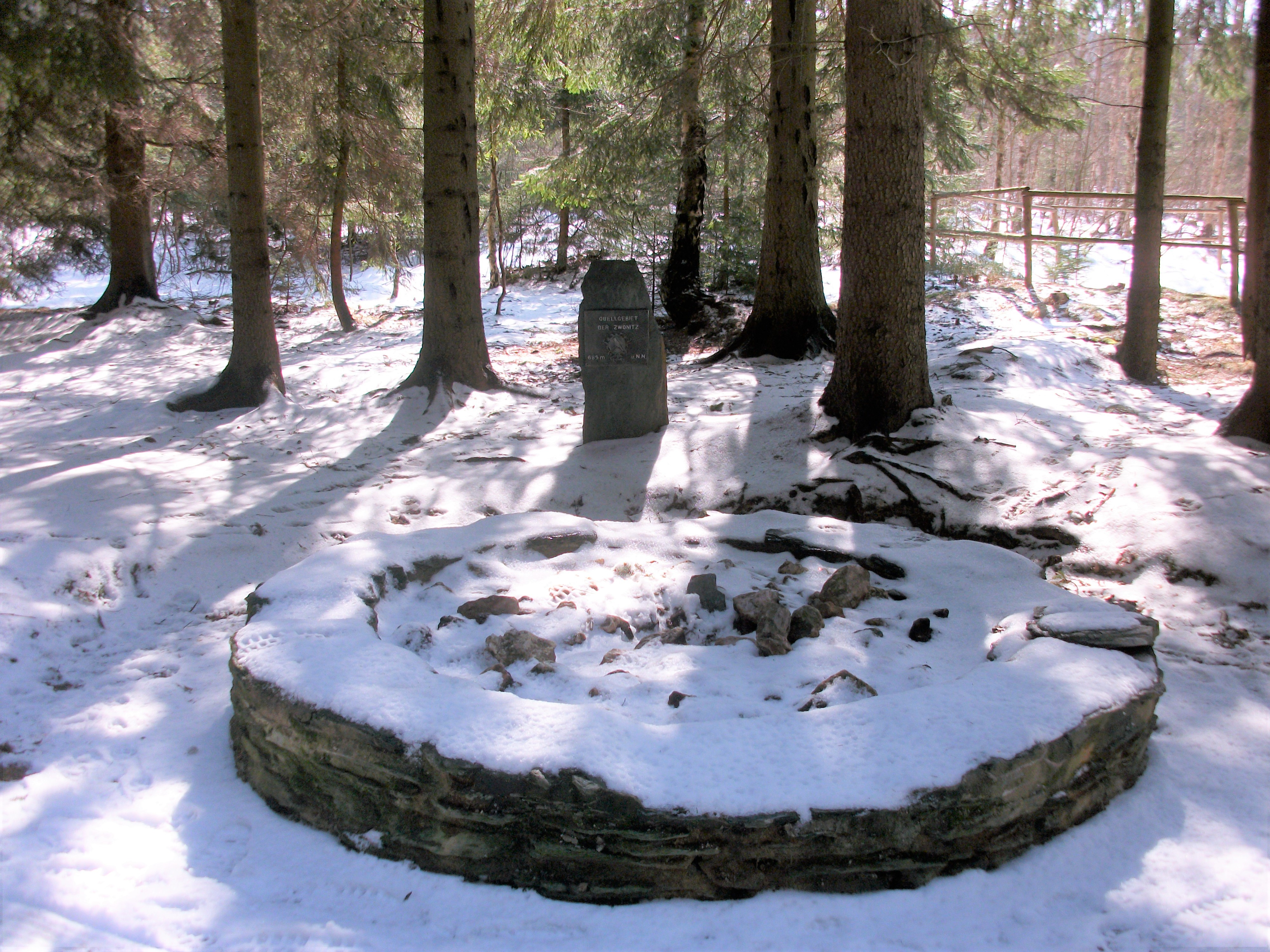 Zwönitzquelle